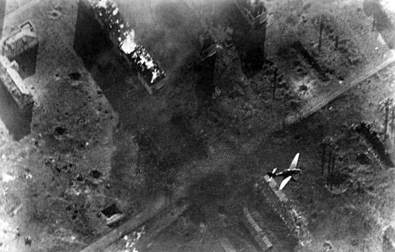 Russland, Kampf um Stalingrad, Luftangriff ADN-ZB II. Weltkrieg 1939-45 An der deutsch-sowjetischen Front im Oktober 1942: Ein Stuka der faschistischen deutschen Luftwaffe hat soeben über Stalingrad eine Bombe abgeworfen. (Aufnahme: Opitz) 5703-42 [Sowjetunion.- Schlacht um Stalingrad.- Luftangriff mit Flugzeug Junkers Ju 87 "Stuka"]